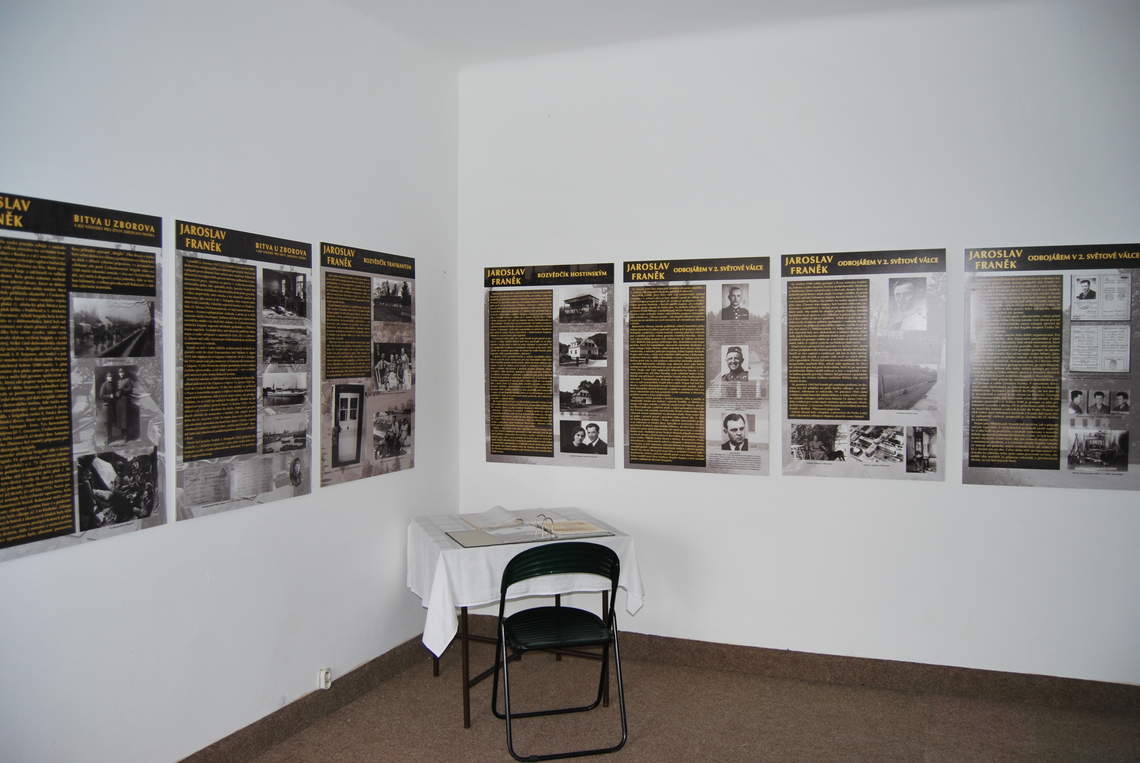 Pohled do interiéru Pamětní síně v budově Obecního úřadu